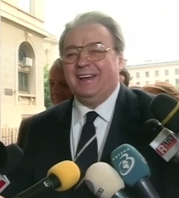 Corneliu Vadim Tudor după depunerea candidaturii la Președenție în 2014. The video was published on the official YouTube Channel, under a CC license.